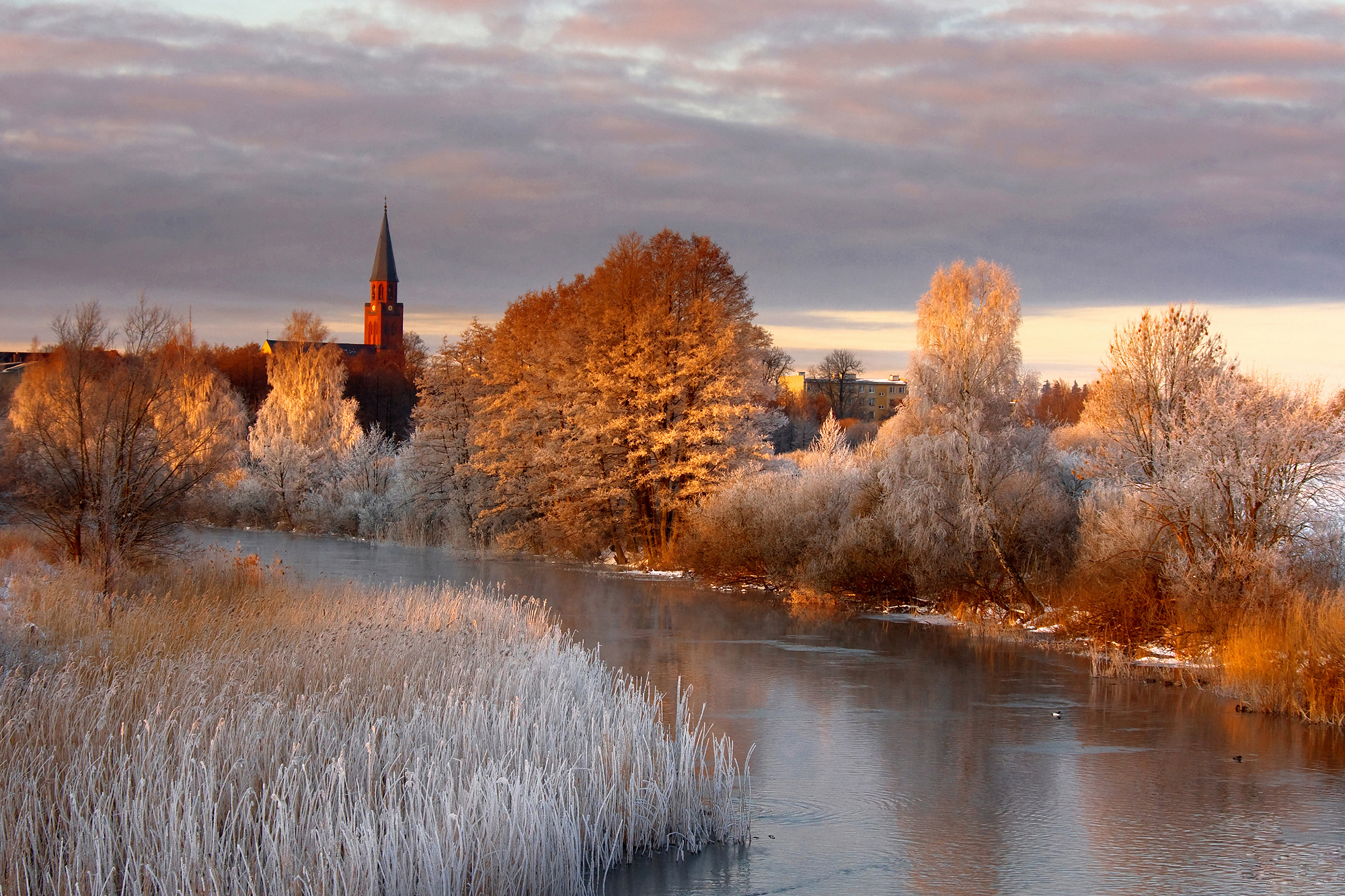 Obszar specjalnej ochrony ptaków Ostoja Drawska. This is a photography of Natura 2000 protected area with ID PLB320019